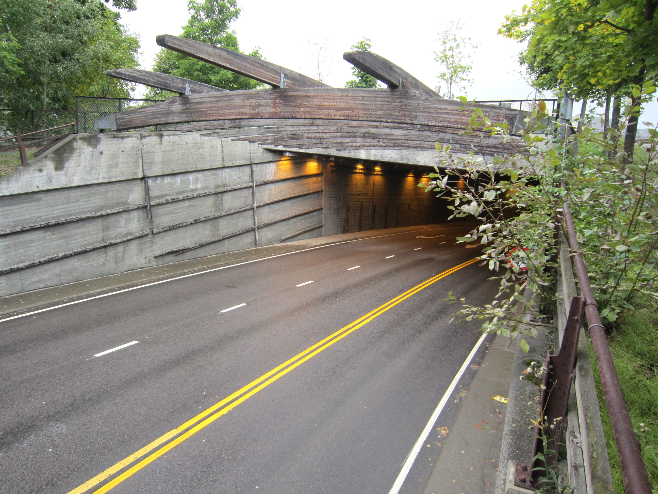 Jernbanetorgtunnelen på Lillehammer sørfra